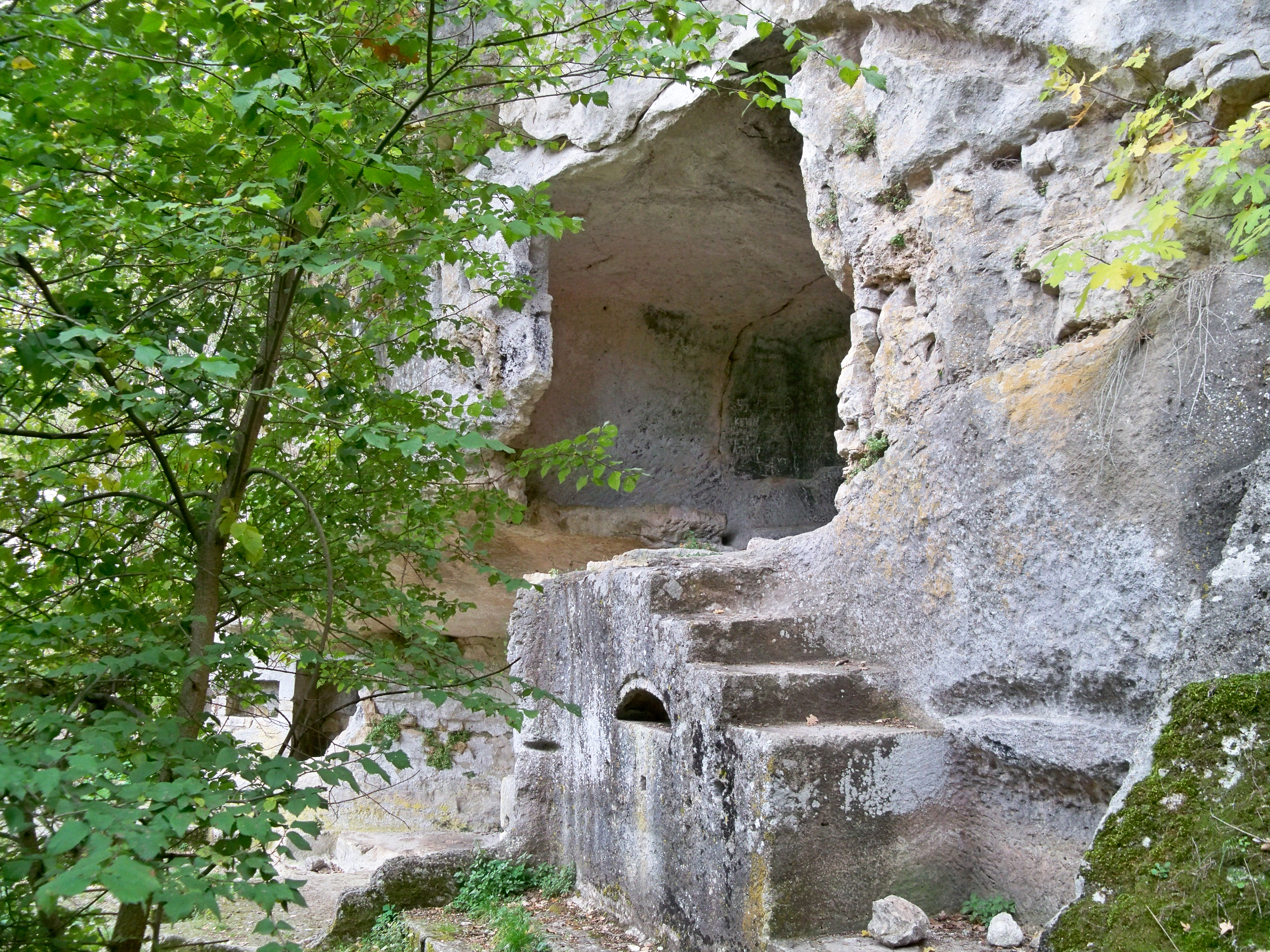 Salle troglodytique du Prieuré de Carluc, à Céreste, Alpes de Haute Provence, France